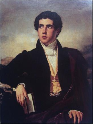 Retrato del pintor chileno José Manuel Ramirez Rosales (1804-1877)